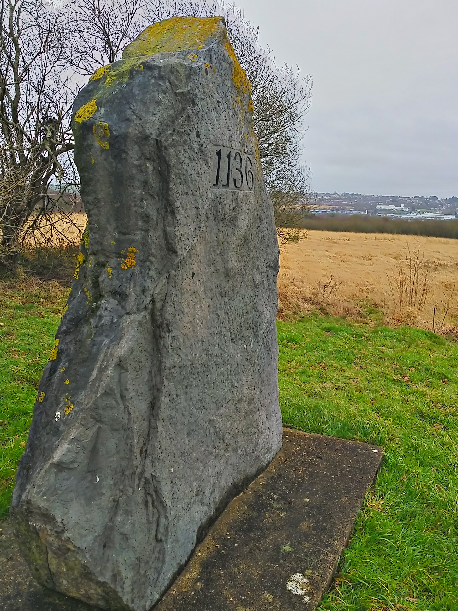 Cofeb Brwydr Garn Goch ac Abertawe yn y Cefndir